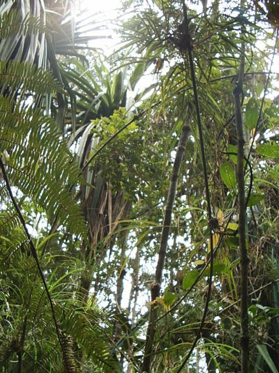 Bosc humit d'Atsinanana.